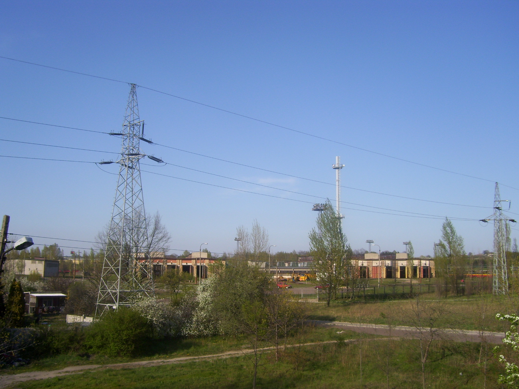 Zajezdnia tramwajowa przy ul. Telefonicznej.